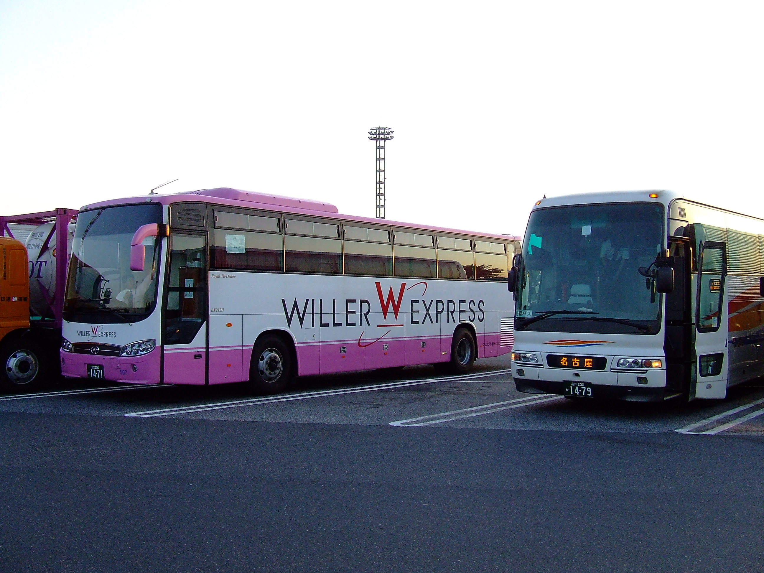 京急高速バス（京急観光バス）「ラメール号」とウィラートラベルのツアーバス（クリスタル観光） 東名高速道路上郷SAにて